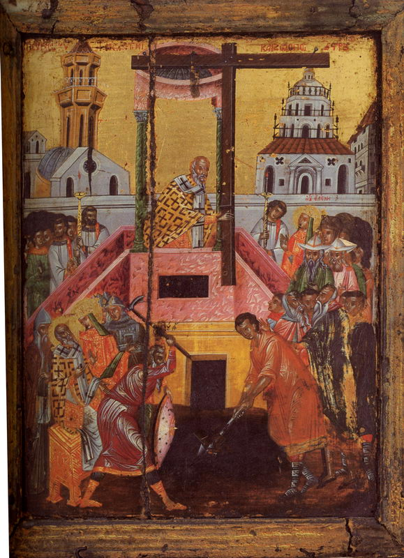 Воздвижение Креста (оборот иконы Всех святых) Век:XVII Место создания: Греция Место хранения: Афон, монастырь Пантократор Реставрация: нет данных Размер: 31 х 24,5 см Материал: Дерево, темпера Персоналии: Святитель Макарий Иерусалимский, священномученик Кириак Иерусалимский, равноапостольный царь Константин, равноапостольная царица Елена